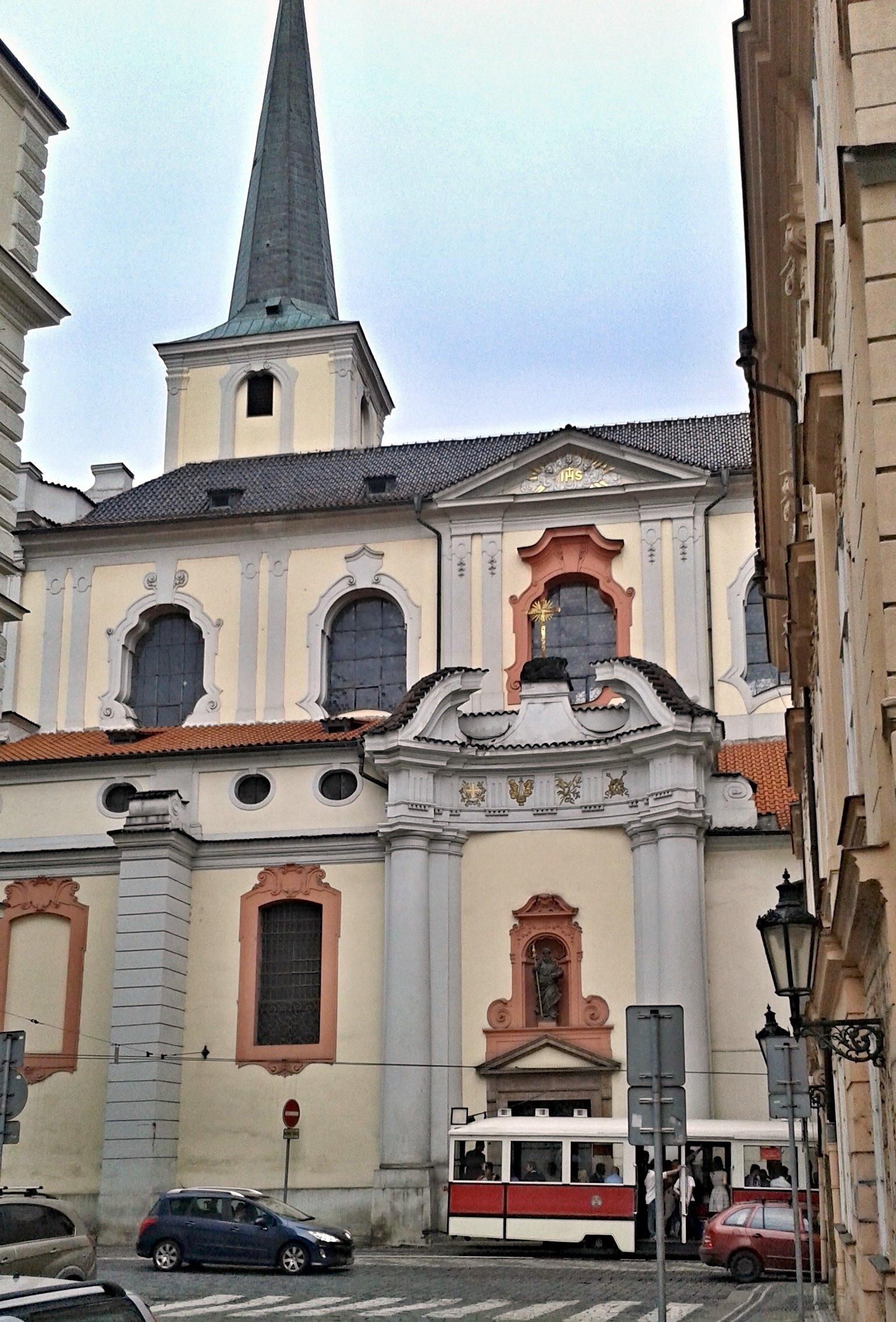 Malá Strana Kostel sv. Tomáše